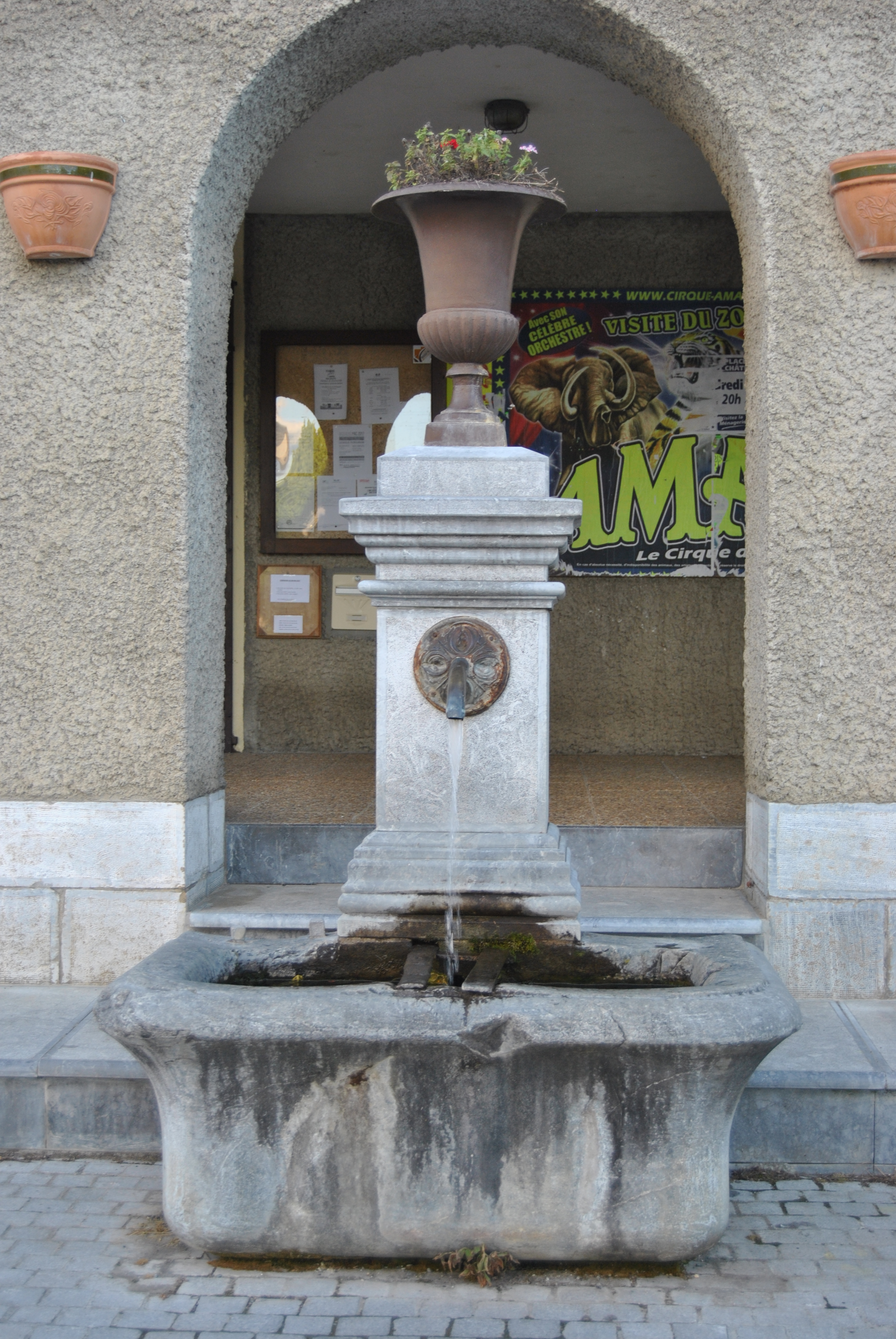 Fontaine d'Avezac